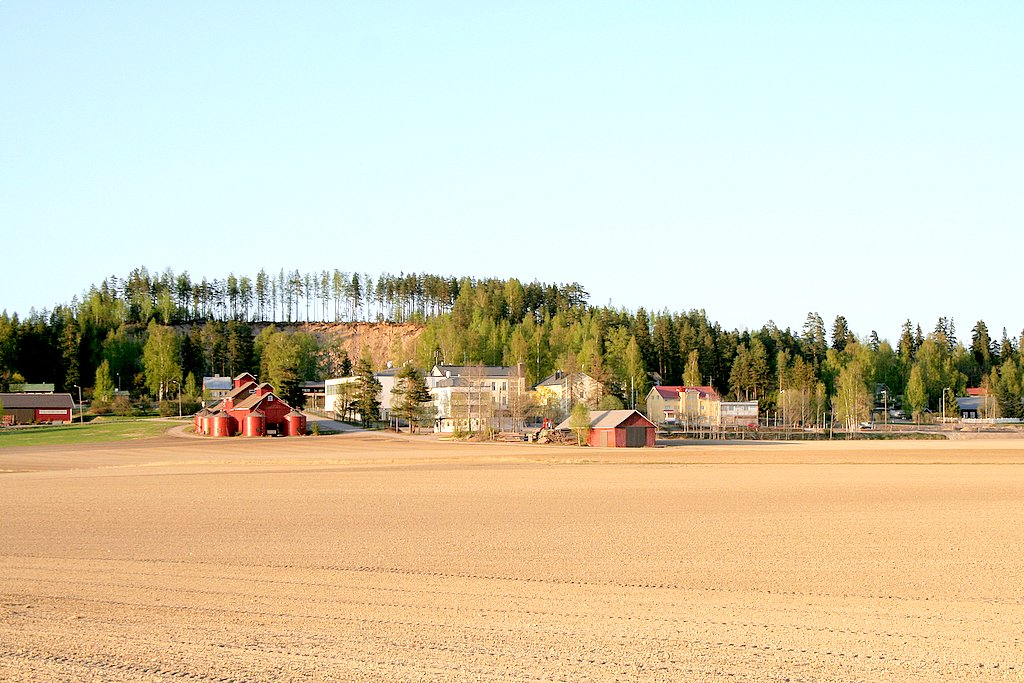 Renkomaki Renkomaki in Lahti, Finland